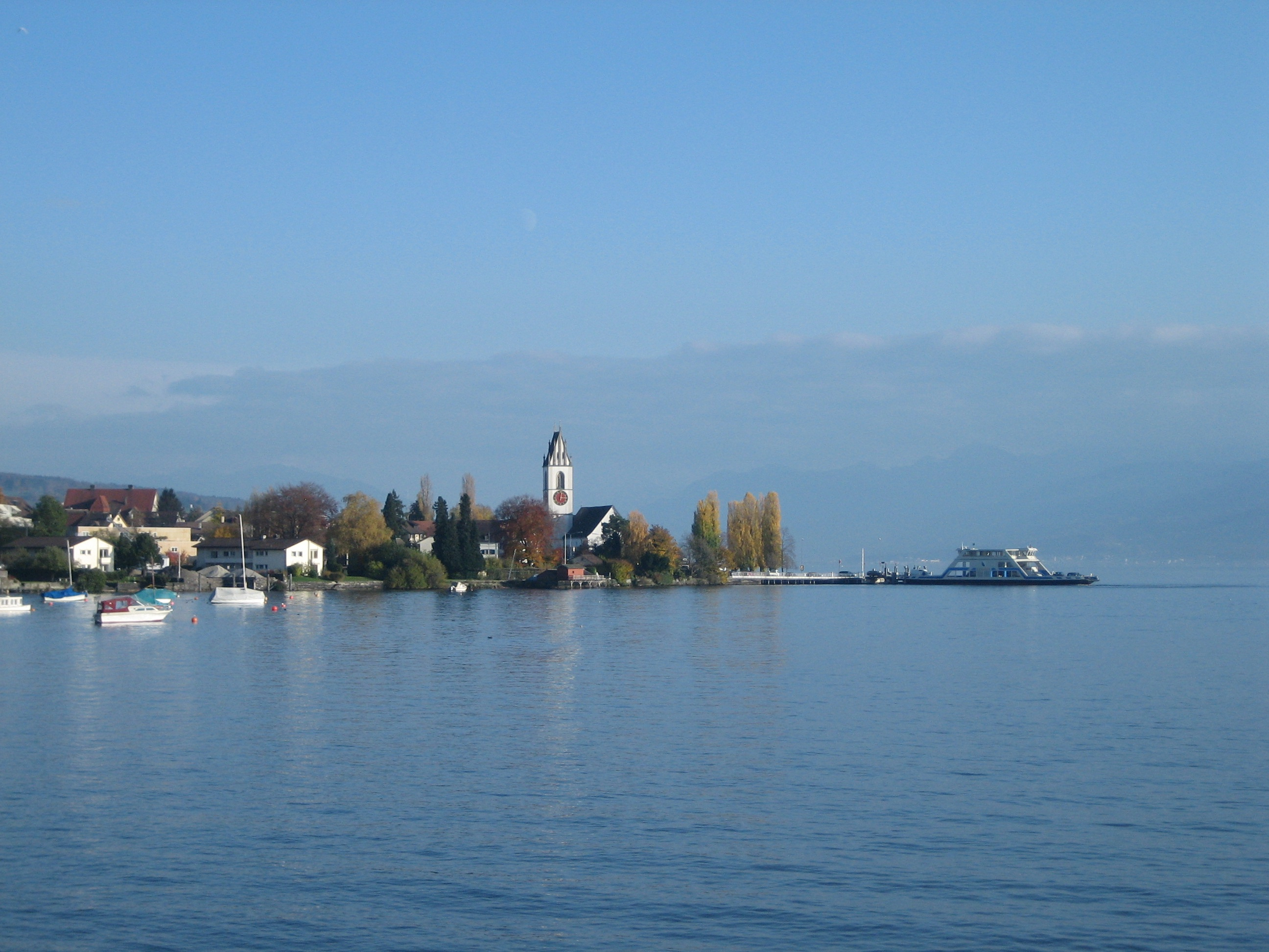 Kirche Meilen mit Fähre, Blick nach Süden